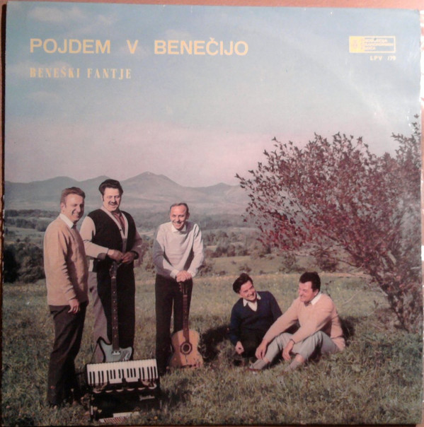 Beneški fantje - Pojdem v Benečijo.